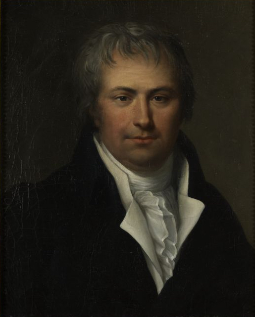 Claude Perier (1742-1801), banquier, industriel, fondateur de la Banque de France, député de l'Isère (1799)